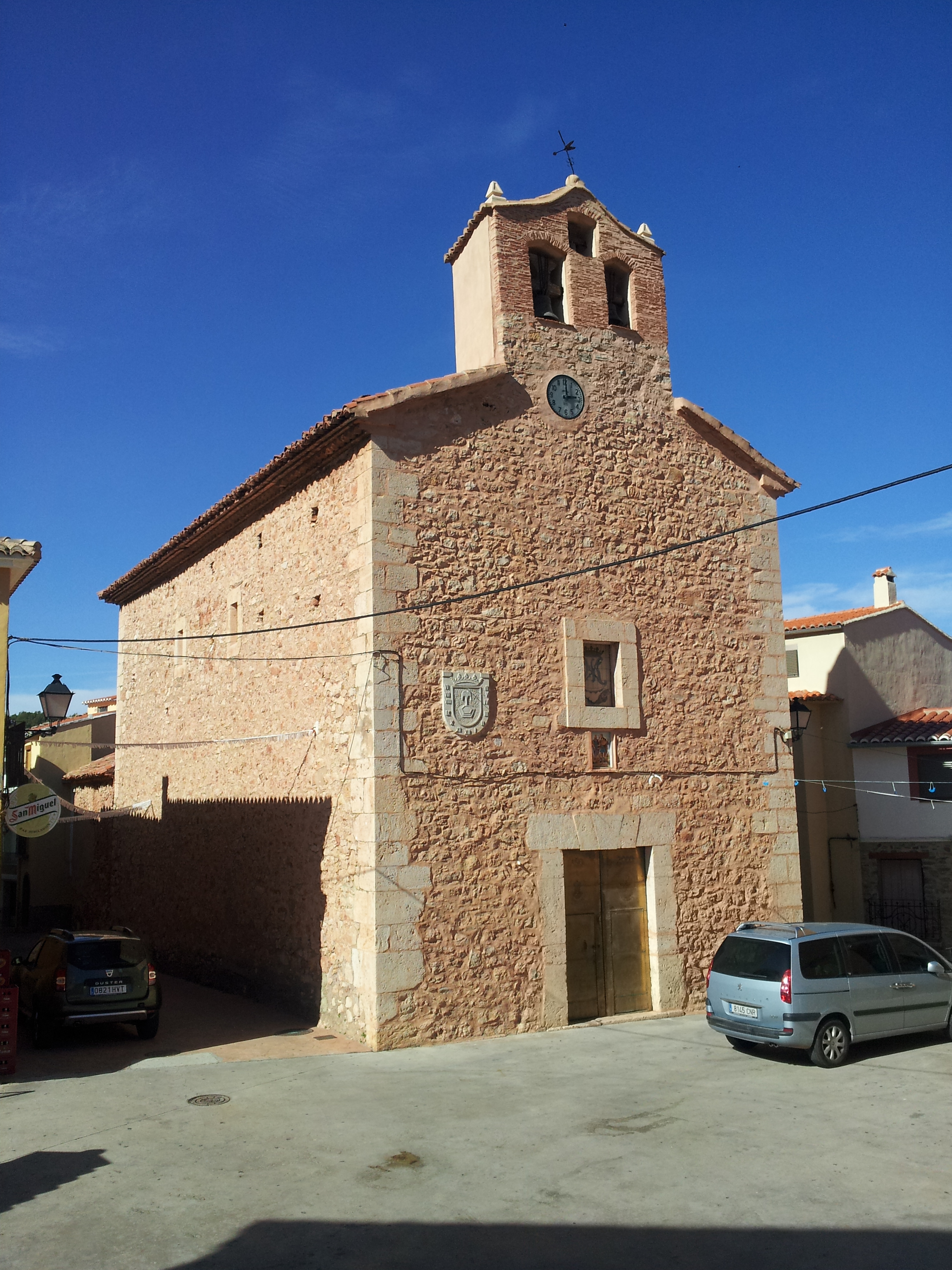 Església.